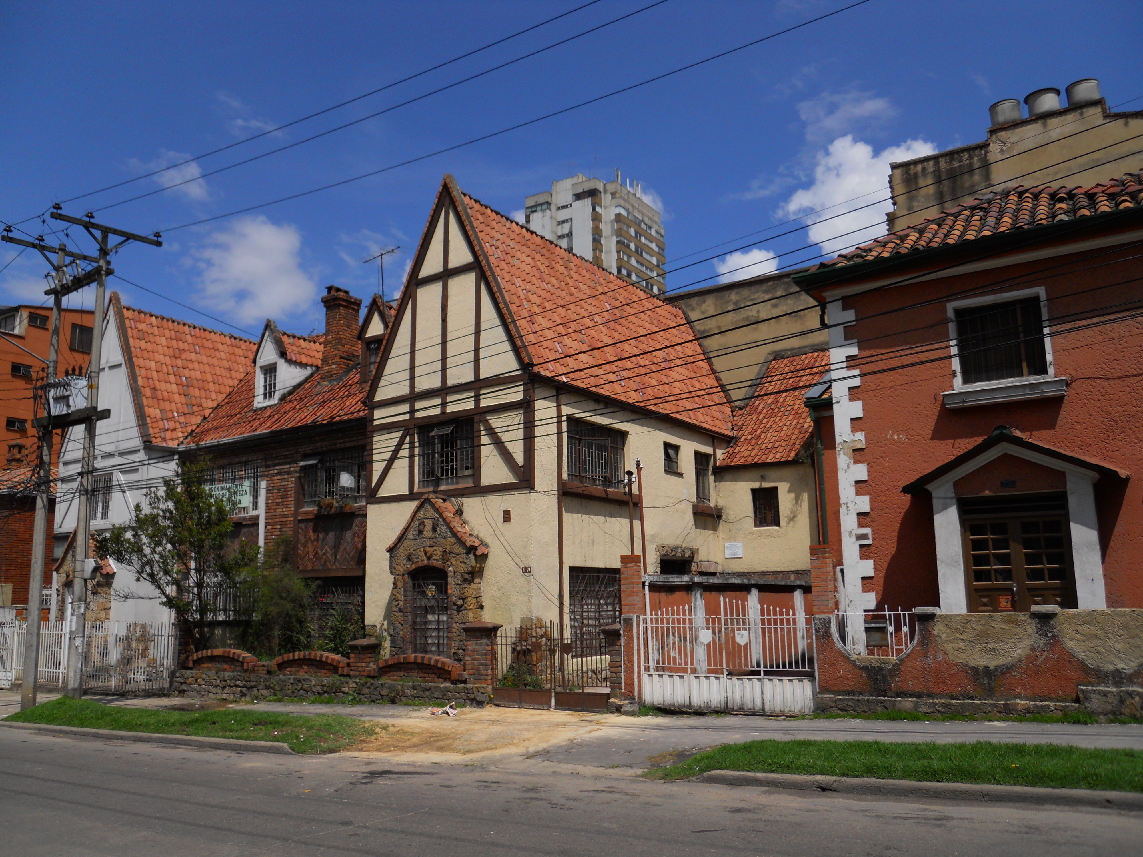 Casas en el barrio María Cristina de la localidad de Chapinero, en la carrera 5 con calle 65 en Bogotá.